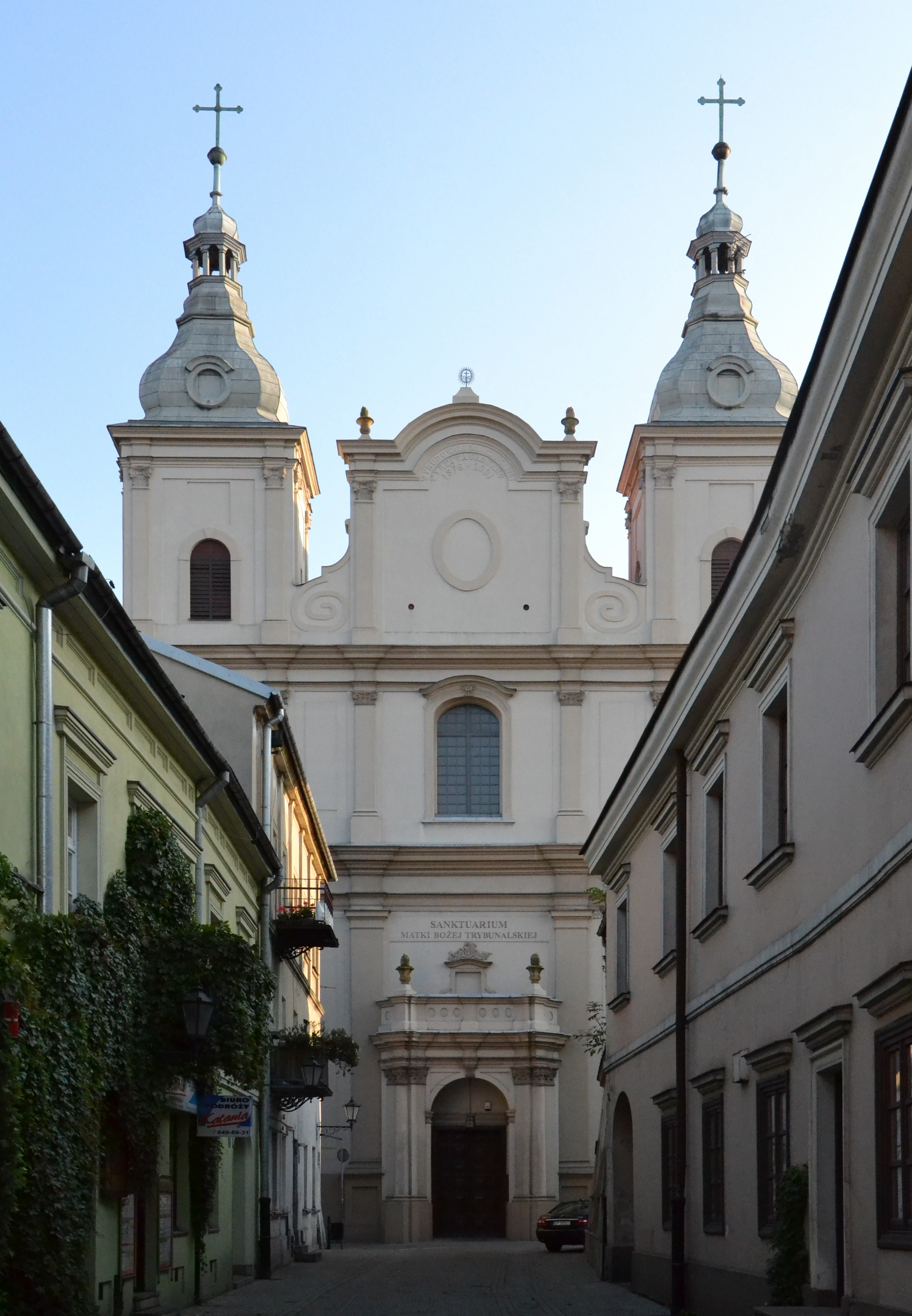 Piotrków Trybunalski, kościół p.w. św. Franciszka Ksawerego, 1695-1727, XIX